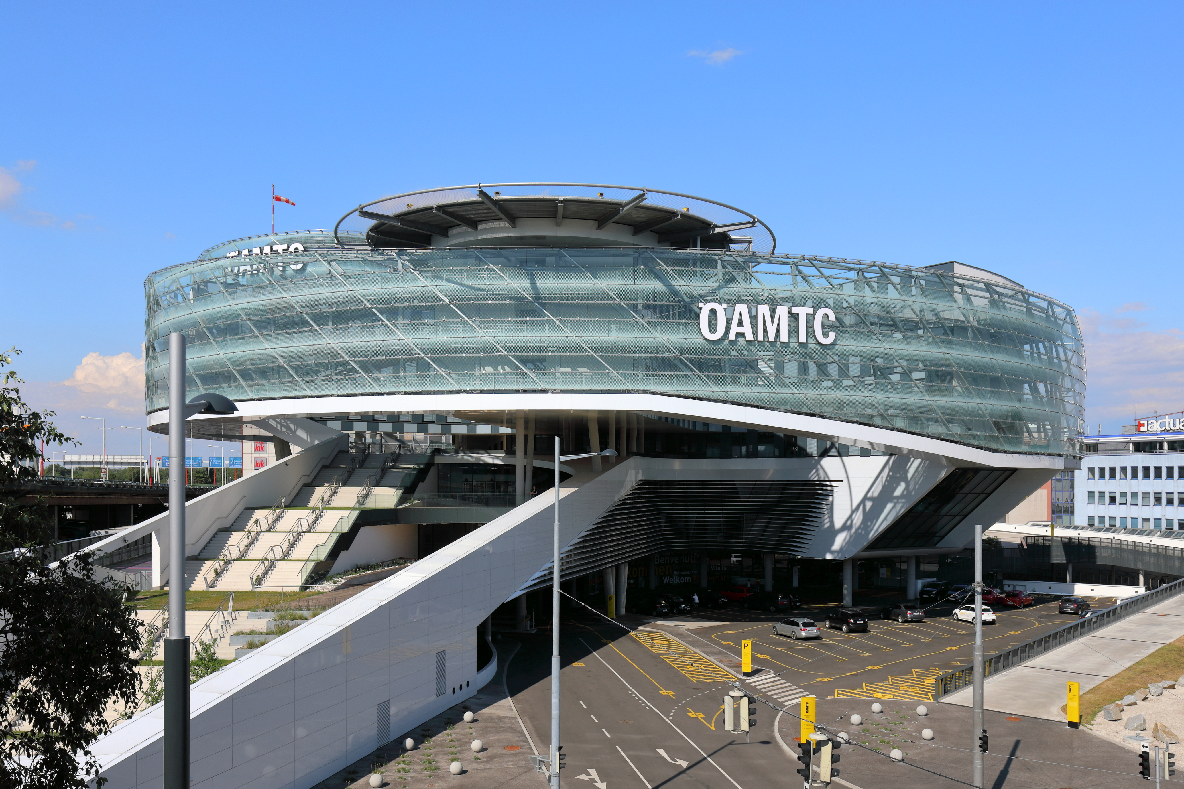 Die neu errichtete ÖAMTC-Zentrale in Erdberg, ein Stadtteil Wiens im 3. Wiener Gemeindebezirk Landstraße, und unmittelbar an der Südosttangente. Das sogenannte Mobilitätszentrum mit rund 27.000 m² Nutzfläche wurde um 76,8 Millionen Euro von dem Architektenbüro Pichler und Traupmann errichtet und im März 2017 offiziell eröffnet. Seit April 2017 ist auf dem Dach der Wiener Notarzthubschrauber Christophorus 9 stationiert, nachdem dieser zuvor 16 Jahre auf dem Areal des einstigen Flughafens Aspern stationiert war.